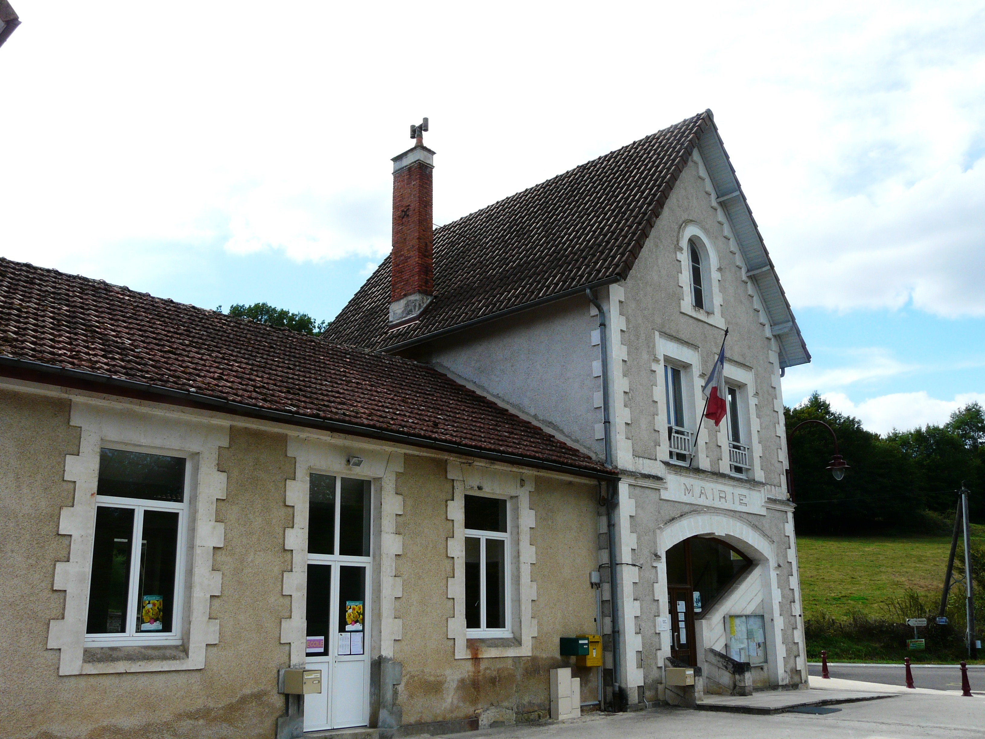 La mairie d'Eyzerac, Dordogne, France.